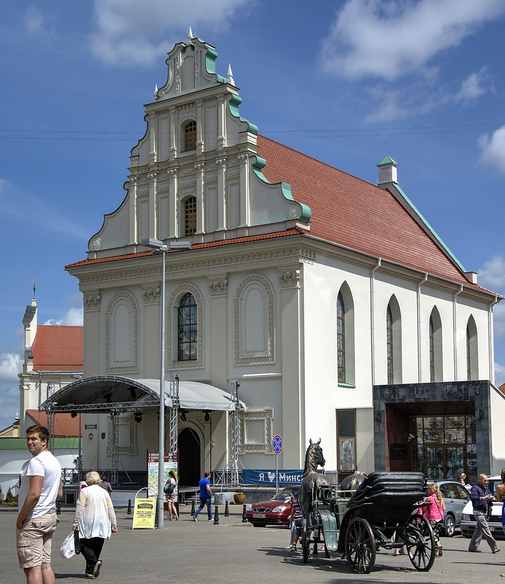 Беларуская (тарашкевіца): Царква Сьвятога Духа (Менск)